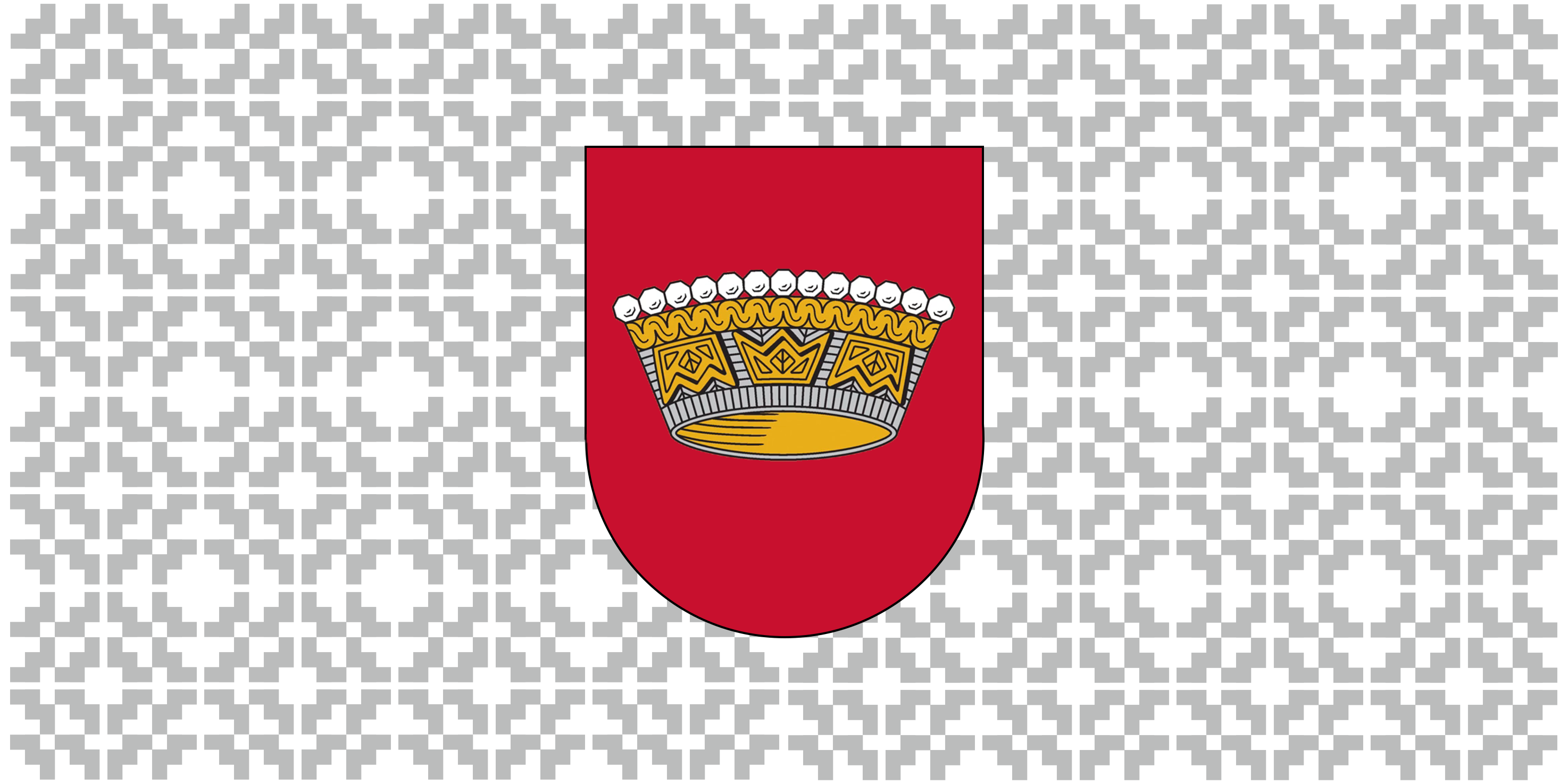 Nīcas novada karogs.